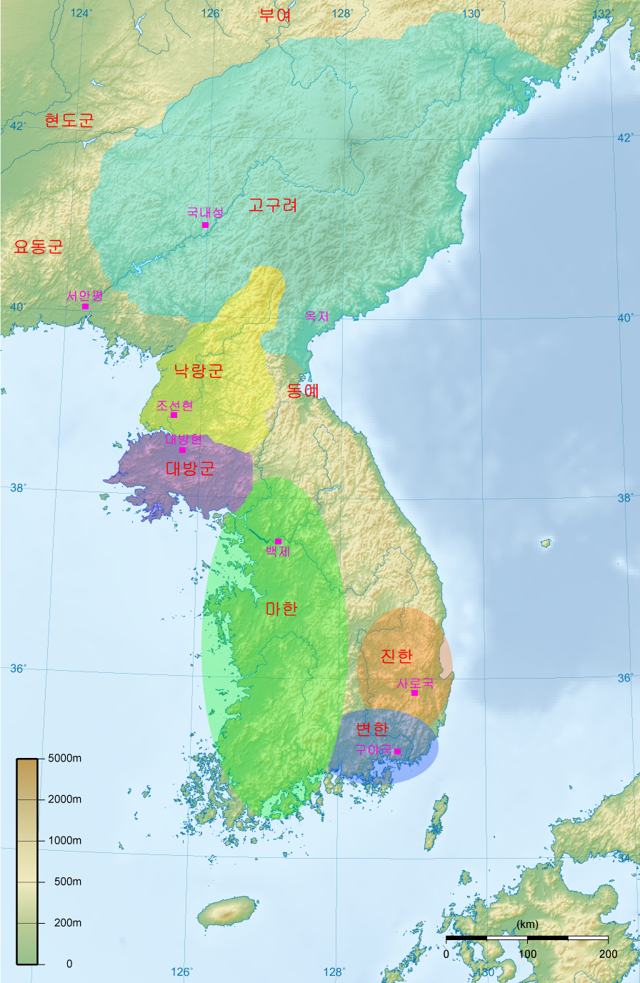 한군현의 지도